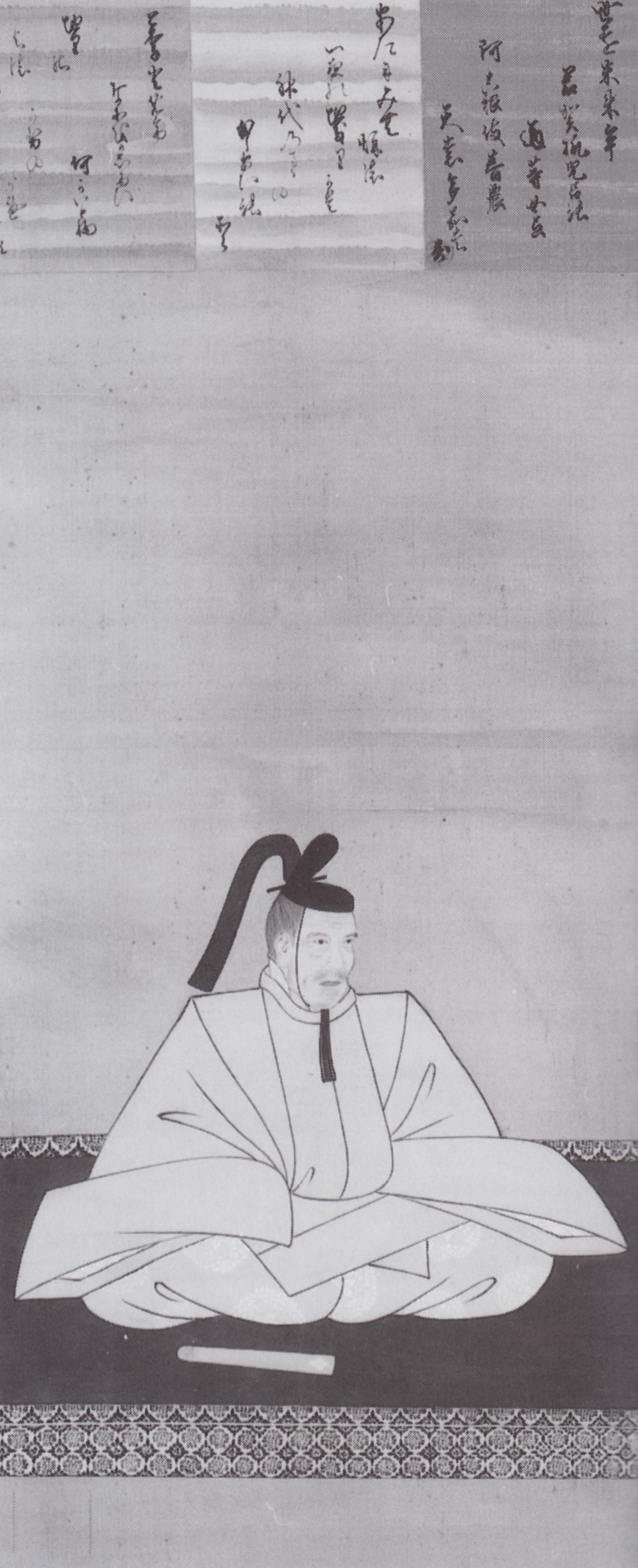 中院通茂像（京都大学文学部博物館蔵）